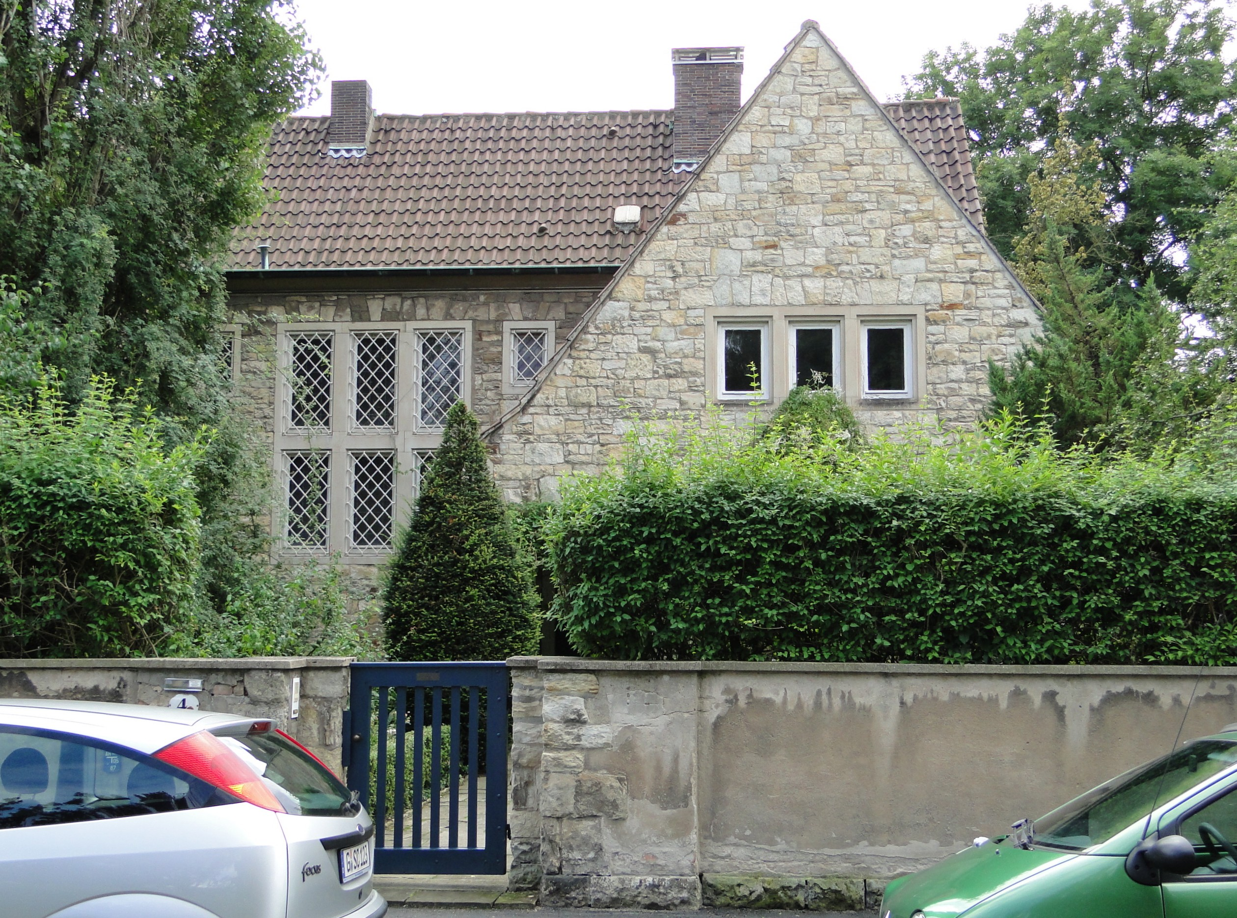 Haus Dr. Geyer in Dresden-Striesen